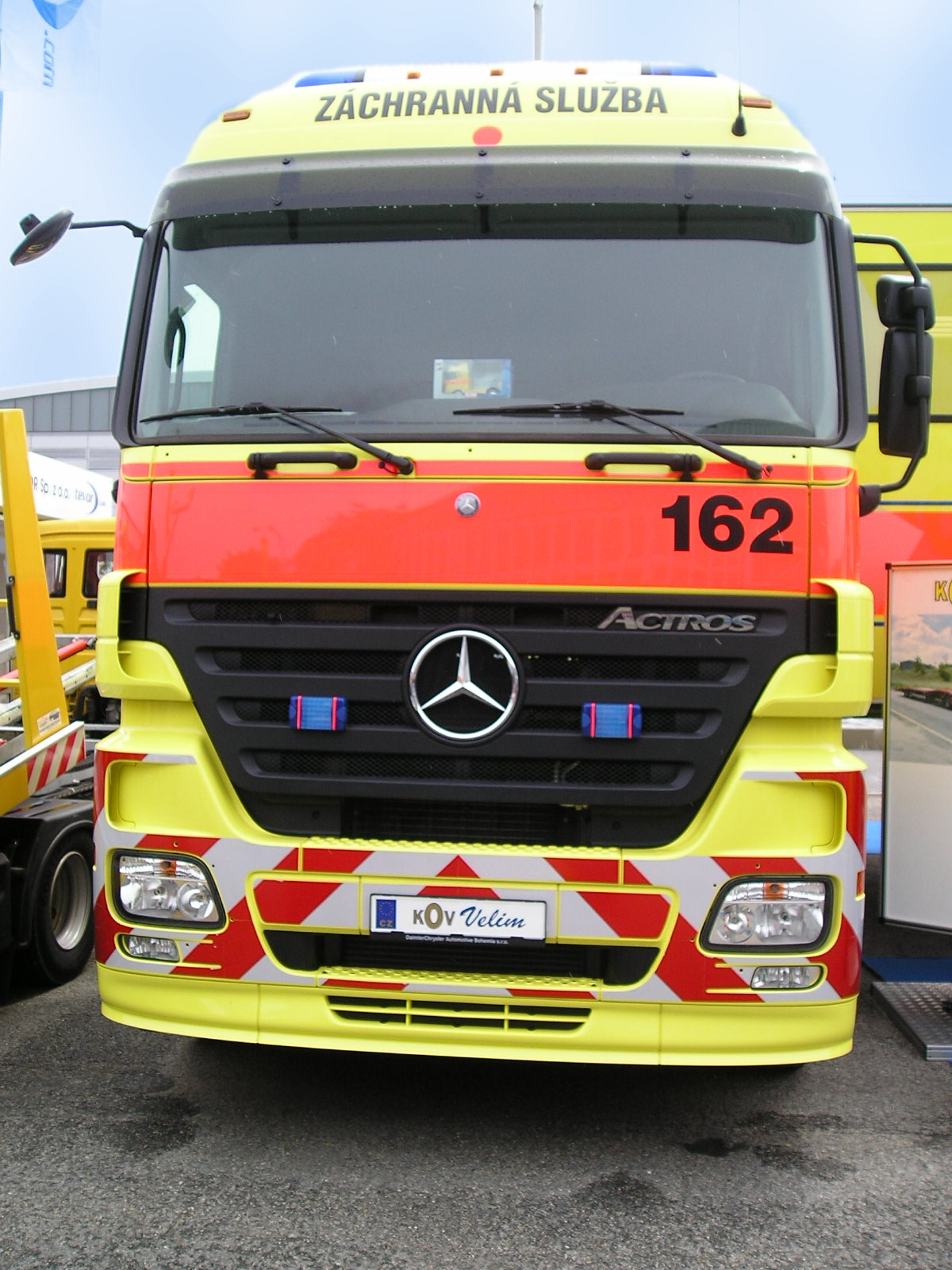 Tahač Mercedes Benz Actros zdravotnického modulu záchranné služby hlavního města Prahy